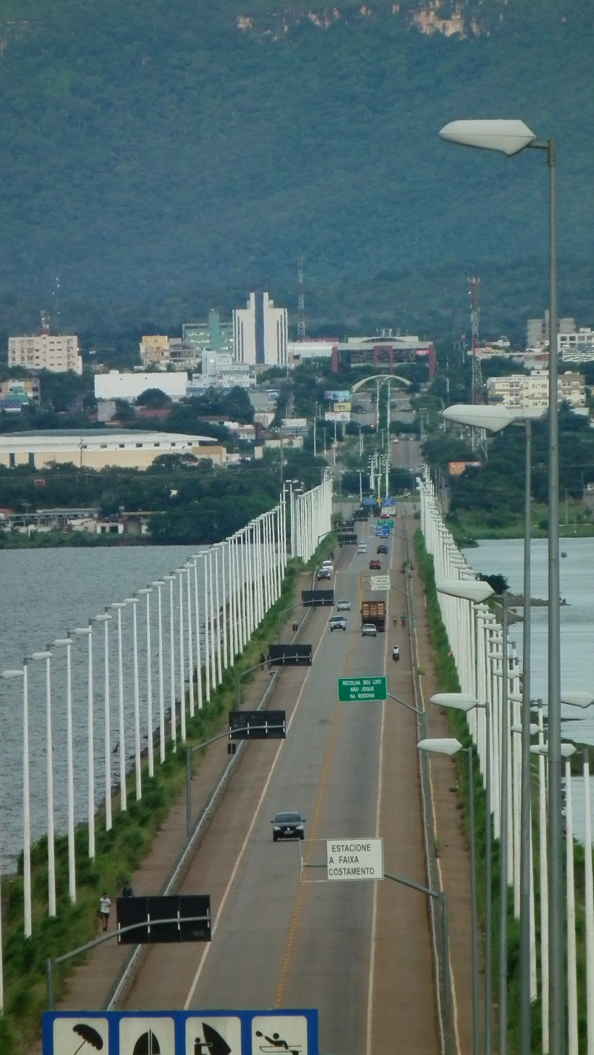 Ponte sobre o Rio Tocantins, em Palmas, 2011.